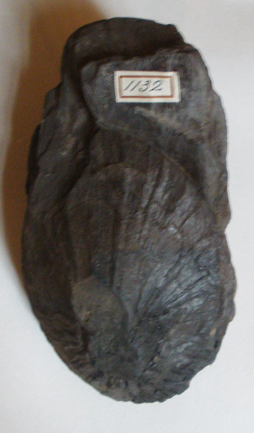 Fossil of Bothrodendron, an extinct plant - Took the photo at Teylers Museum, Haarlem